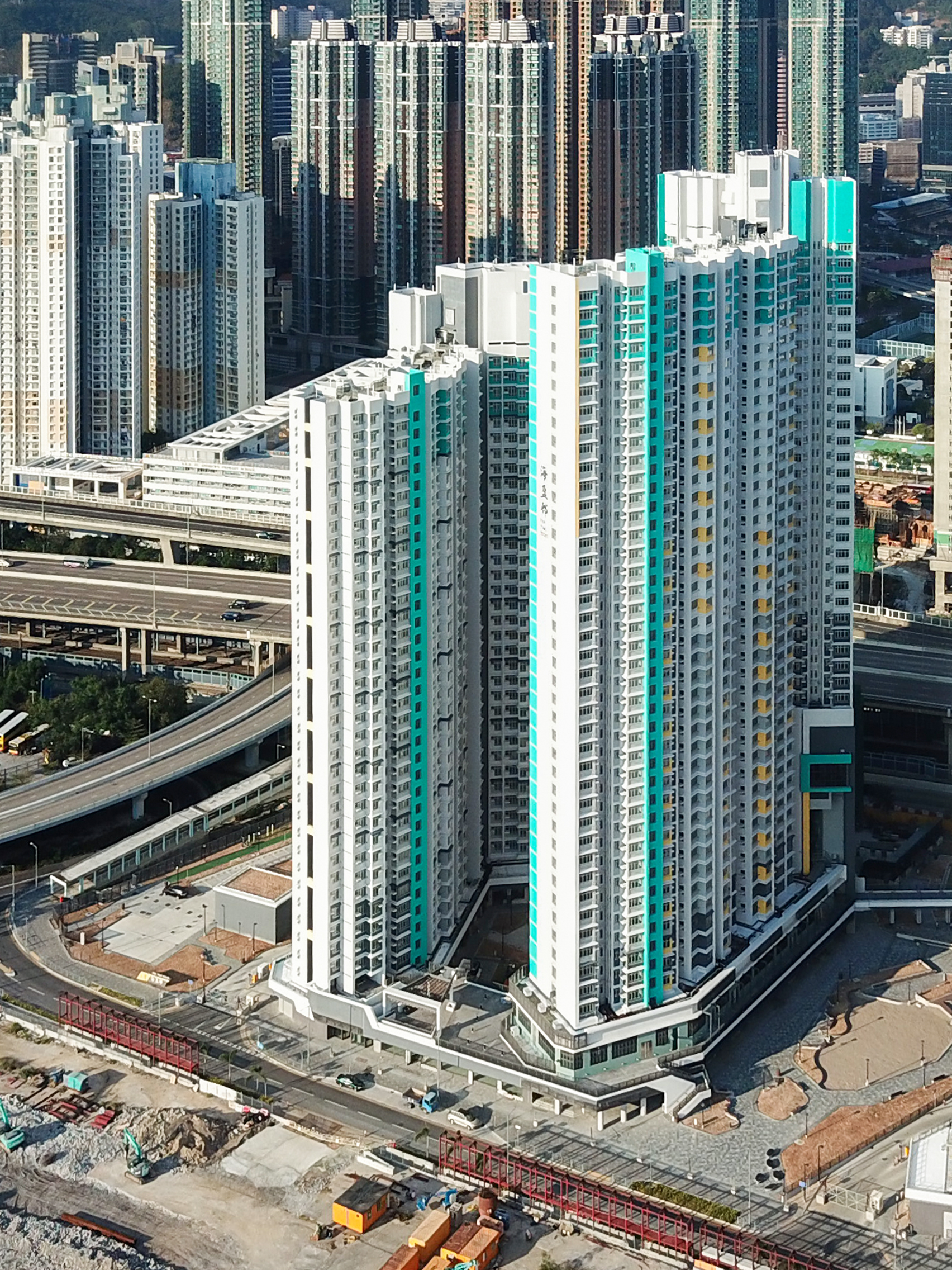 Hoi Ying Estate